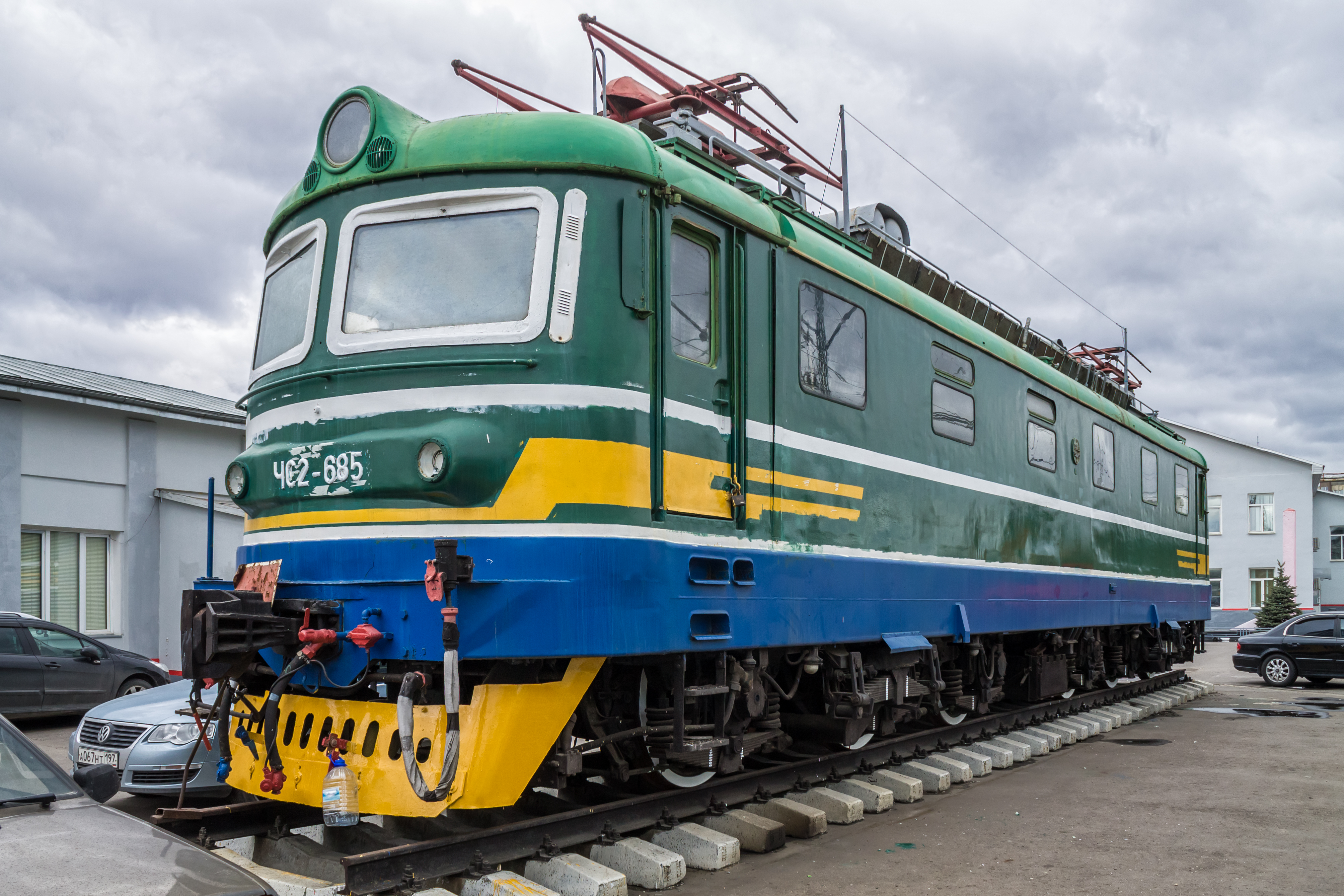 ЧС2-685, депо Москва-Пассажирская-Курская см. фото 693038 в альбоме автора